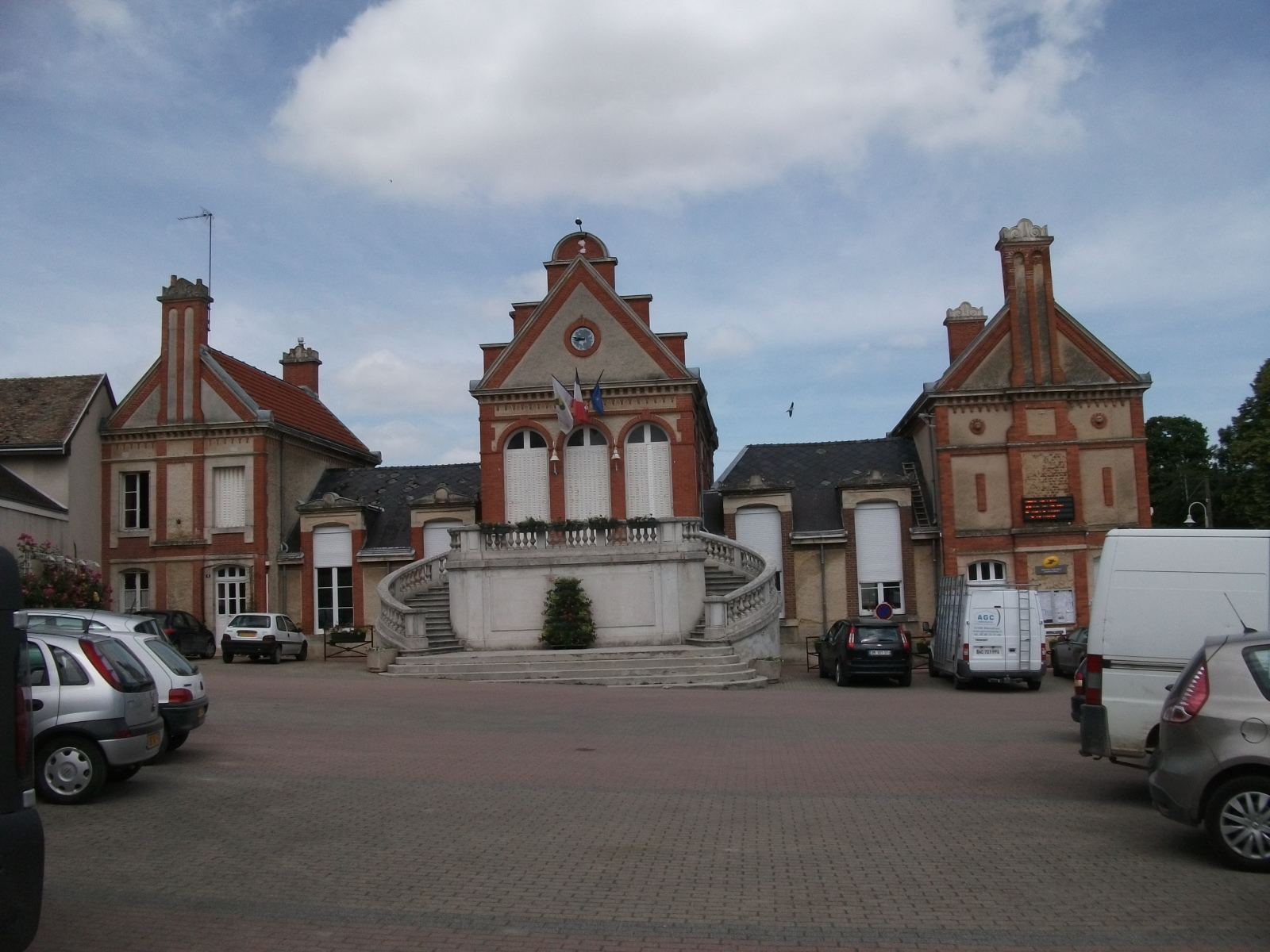 Une vue de la mairie de Chigny-les-Roses depuis la fontaine Pommery.